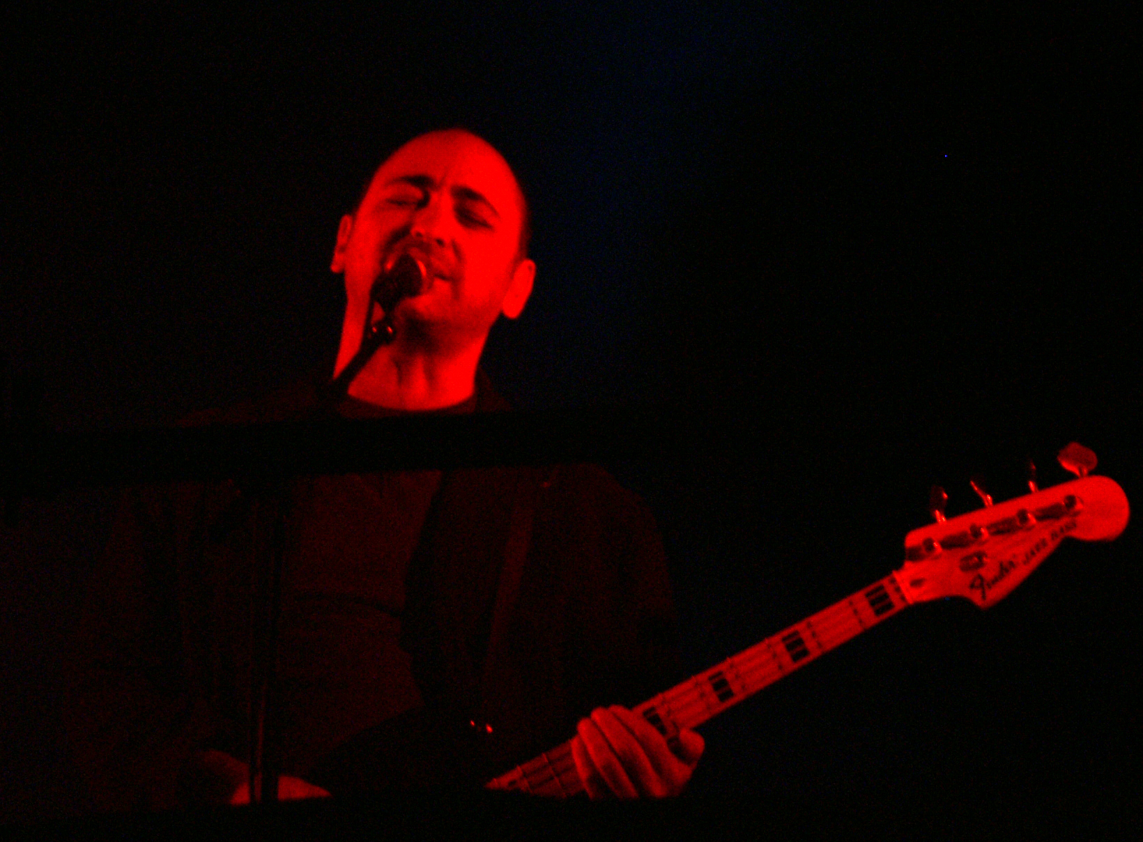 אבי בללי בהופעה עם נקמת הטרקטור - יום הסטודנט 2006